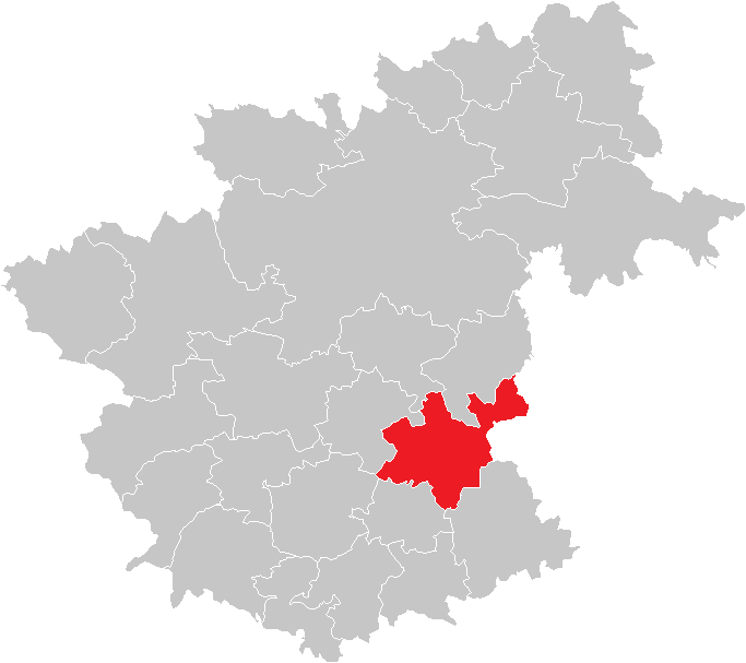 Bezirk Zwettl